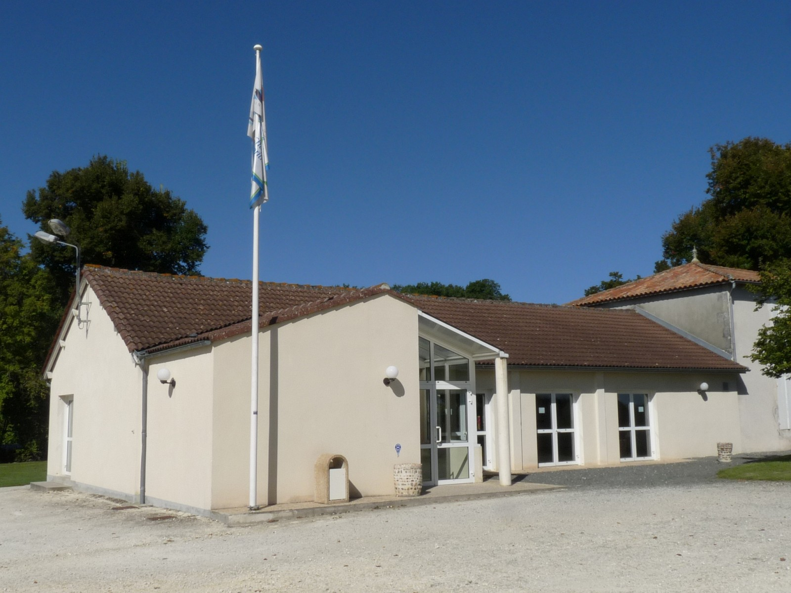 Salle des fêtes de St-Eugène, Charente-Maritime, France